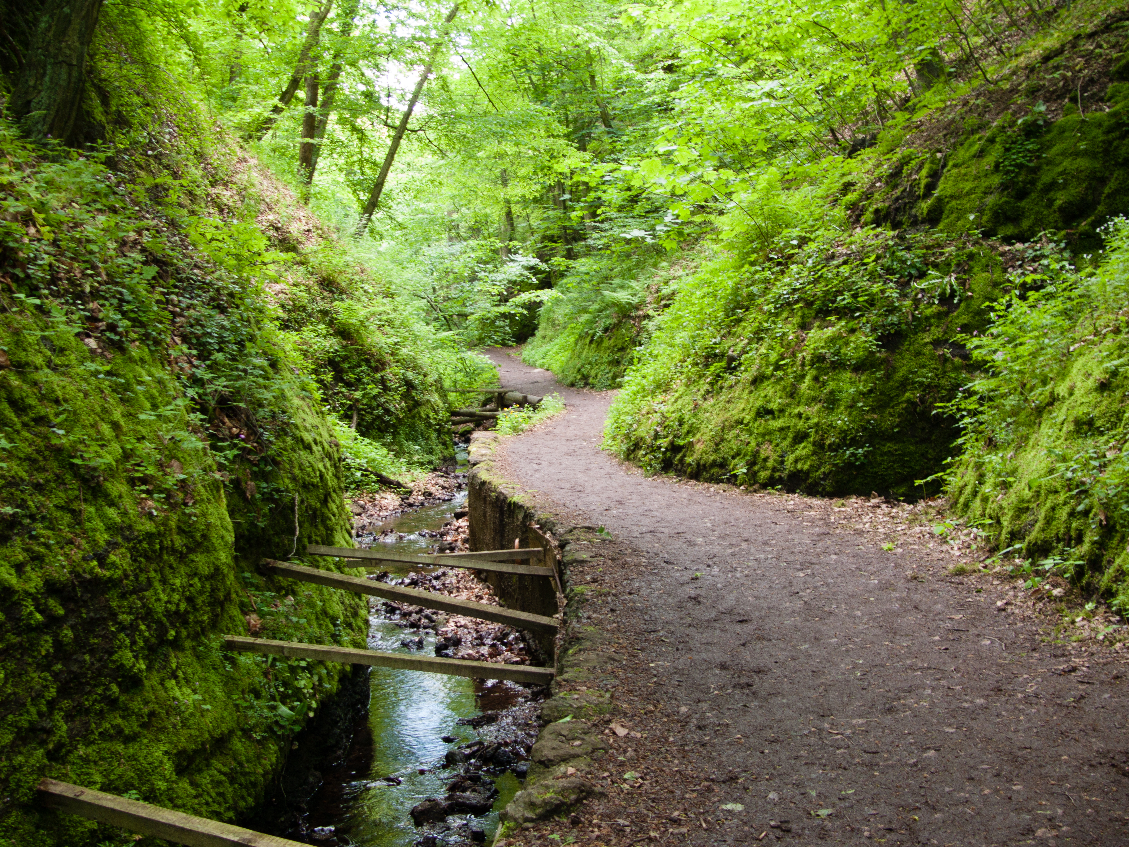 Eine der Engstellen vor der eigentlichen Drachenschlucht; NSG „Wartburg–Hohe Sonne“, Thüringen.